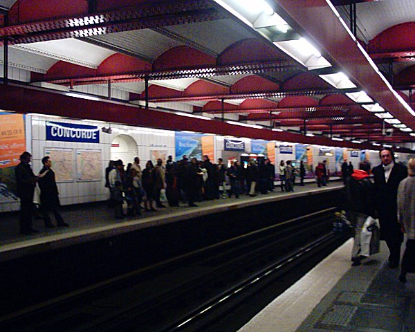 Station de la Concorde du Métropolitain de Paris.